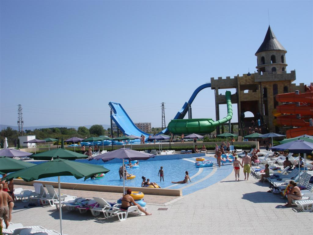 Aquapark Ravda Nesebar